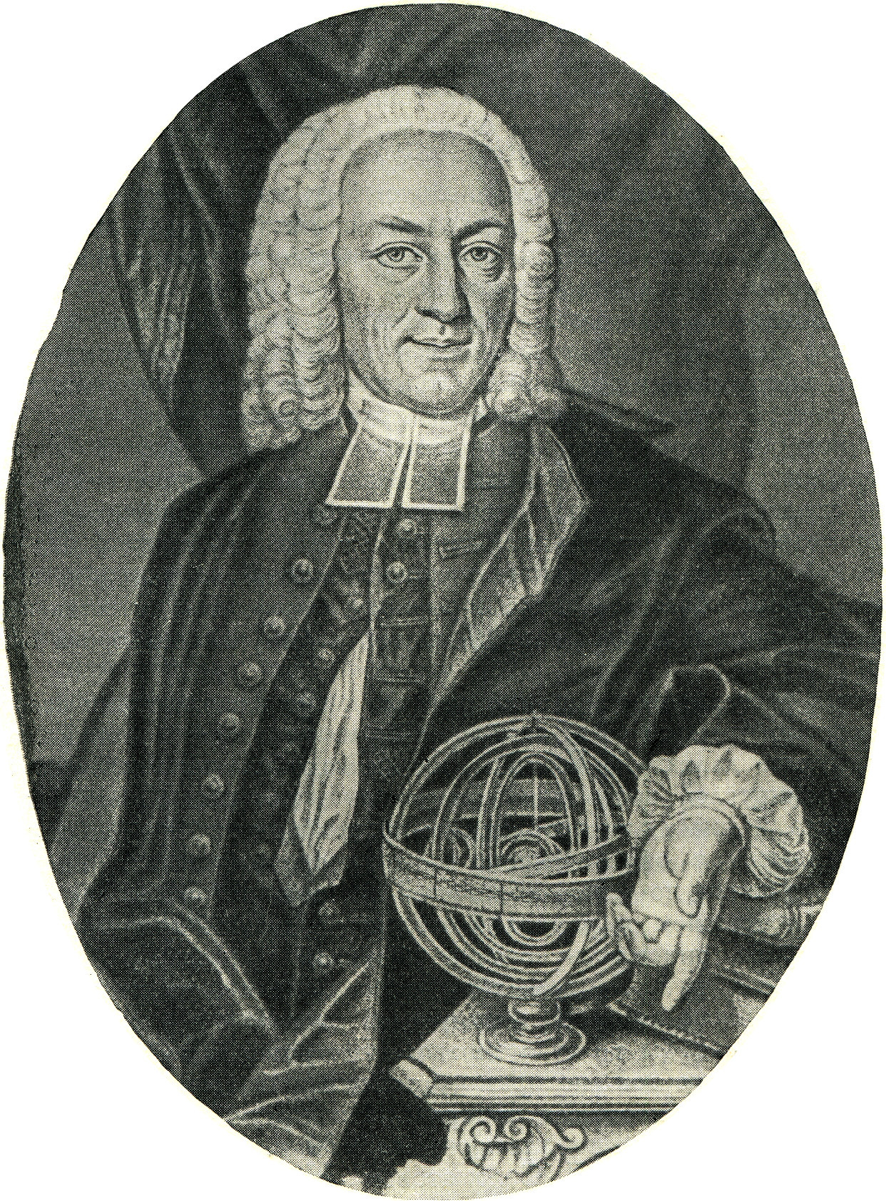 Georg Wolfgang Krafft, Schabkunst (Ausschnitt)